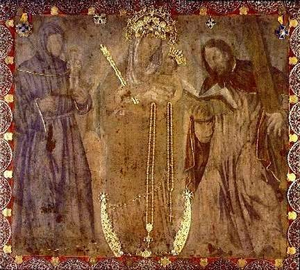 Reliquia con la imagen de Virgen de Chiquinquirá en la Basílica de Chiquinquirá, Colombia